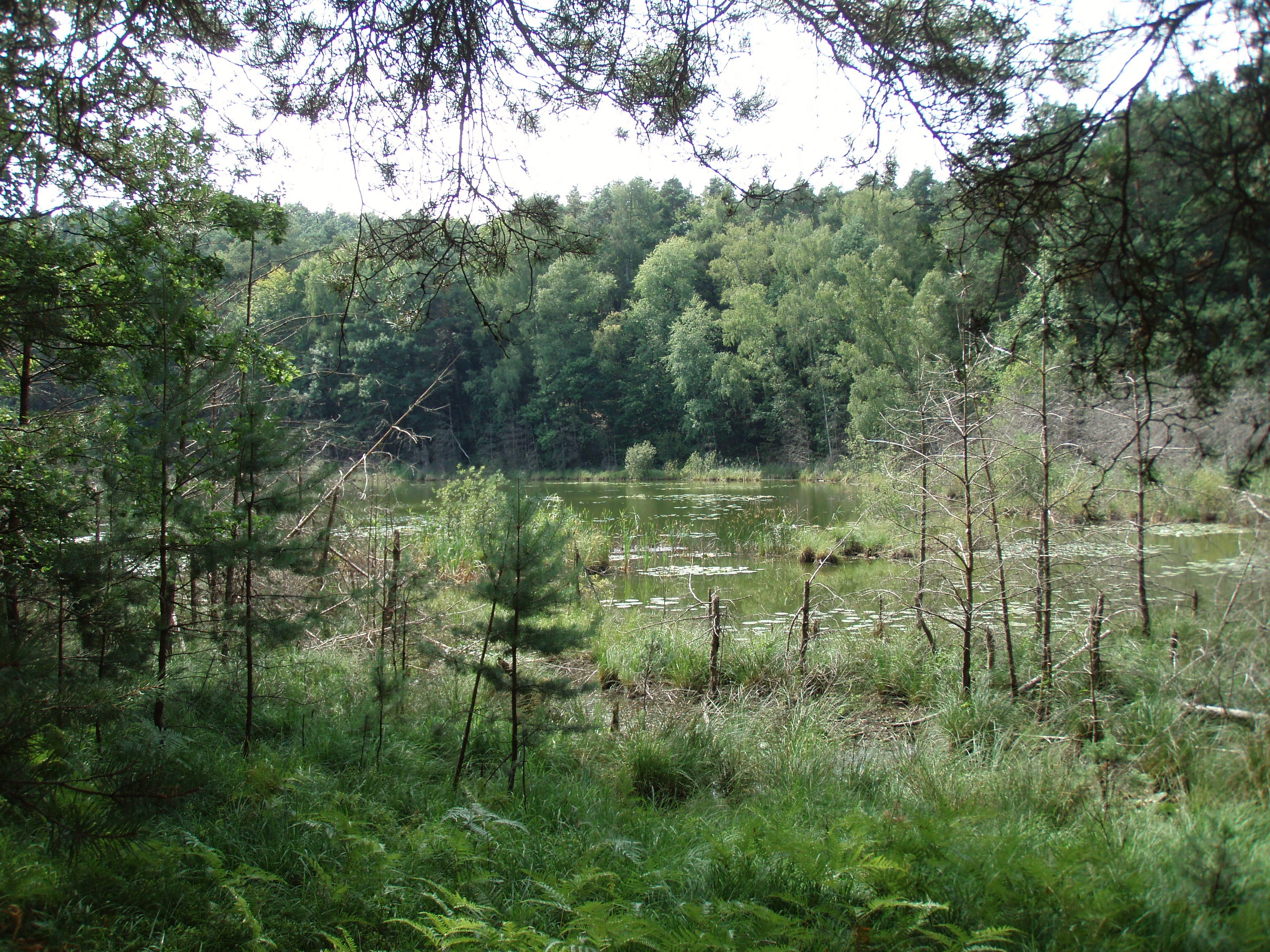 Der Teufelssee bei Siehdichum (Schlaubetal) im Naturschutzgebiet Teufelssee (54,47 ha, 1958 gegründet)